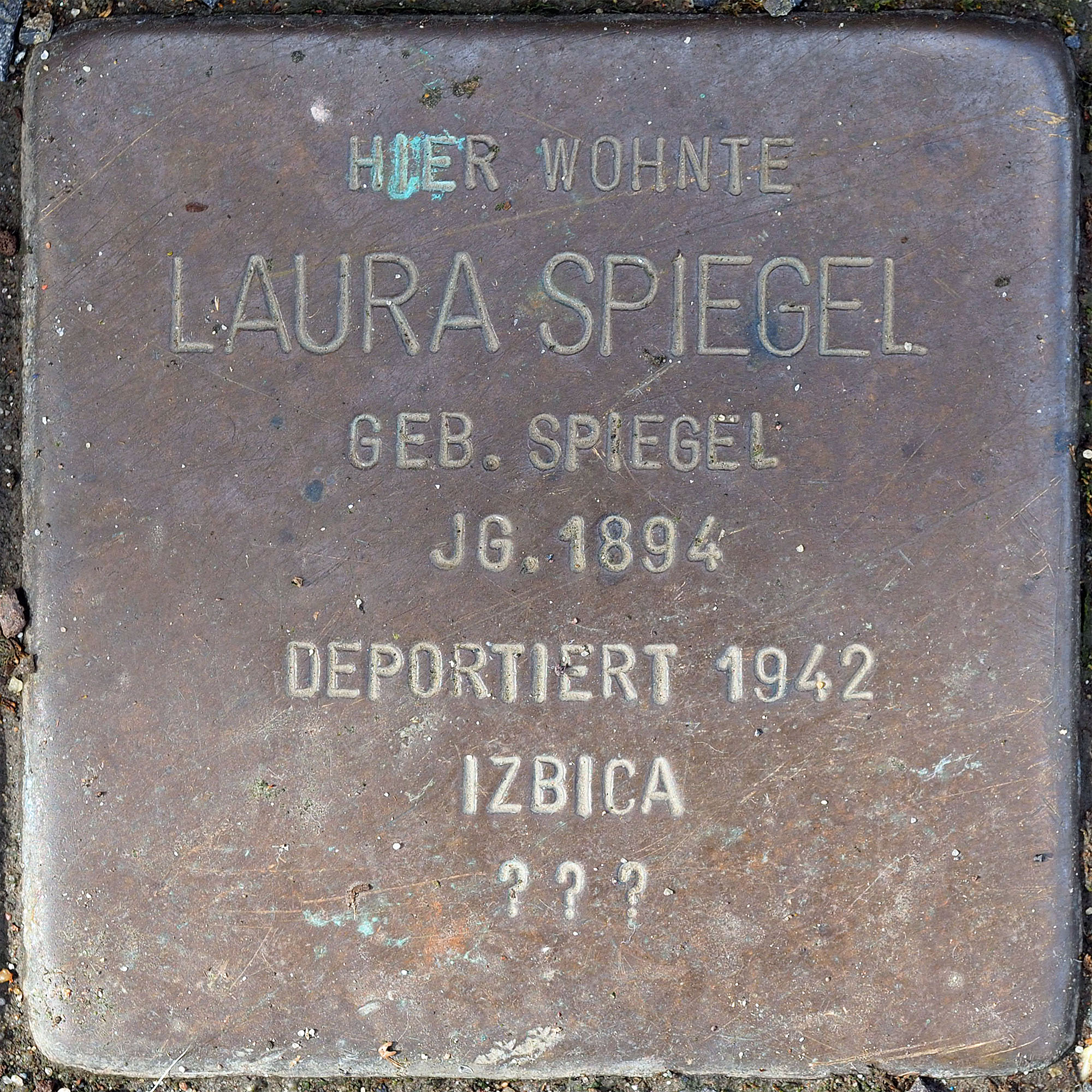 Stolpersteine MG: Spiegel, Laura